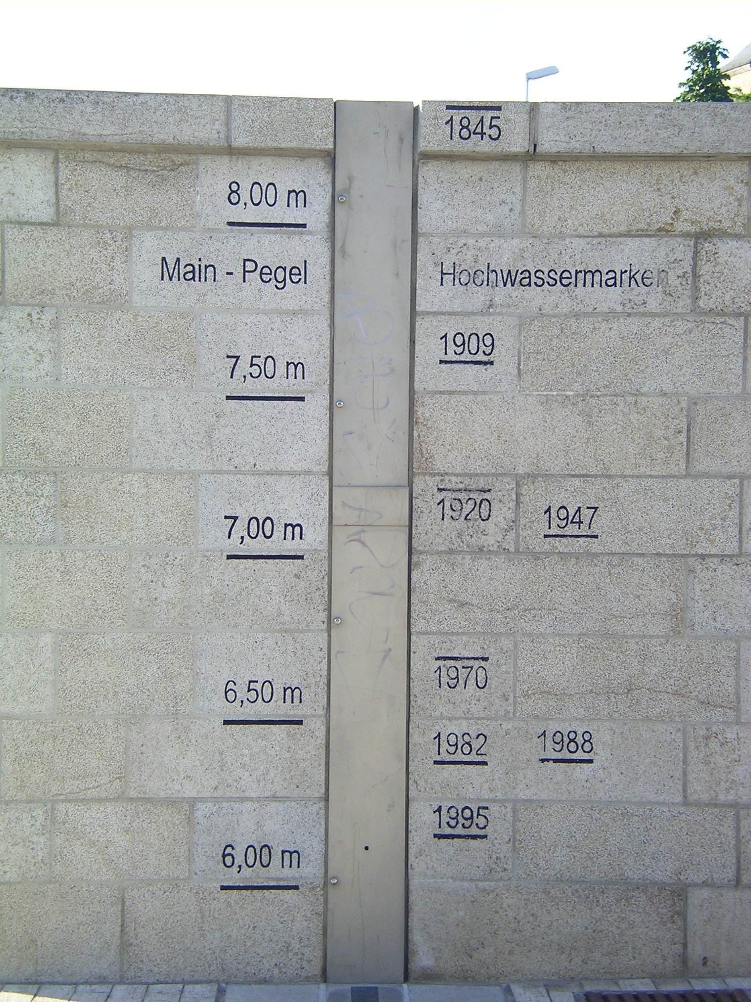 Hochwassermarken an der Hochwasserschutzmauer in der Nähe des Alten Kranen in Würzburg